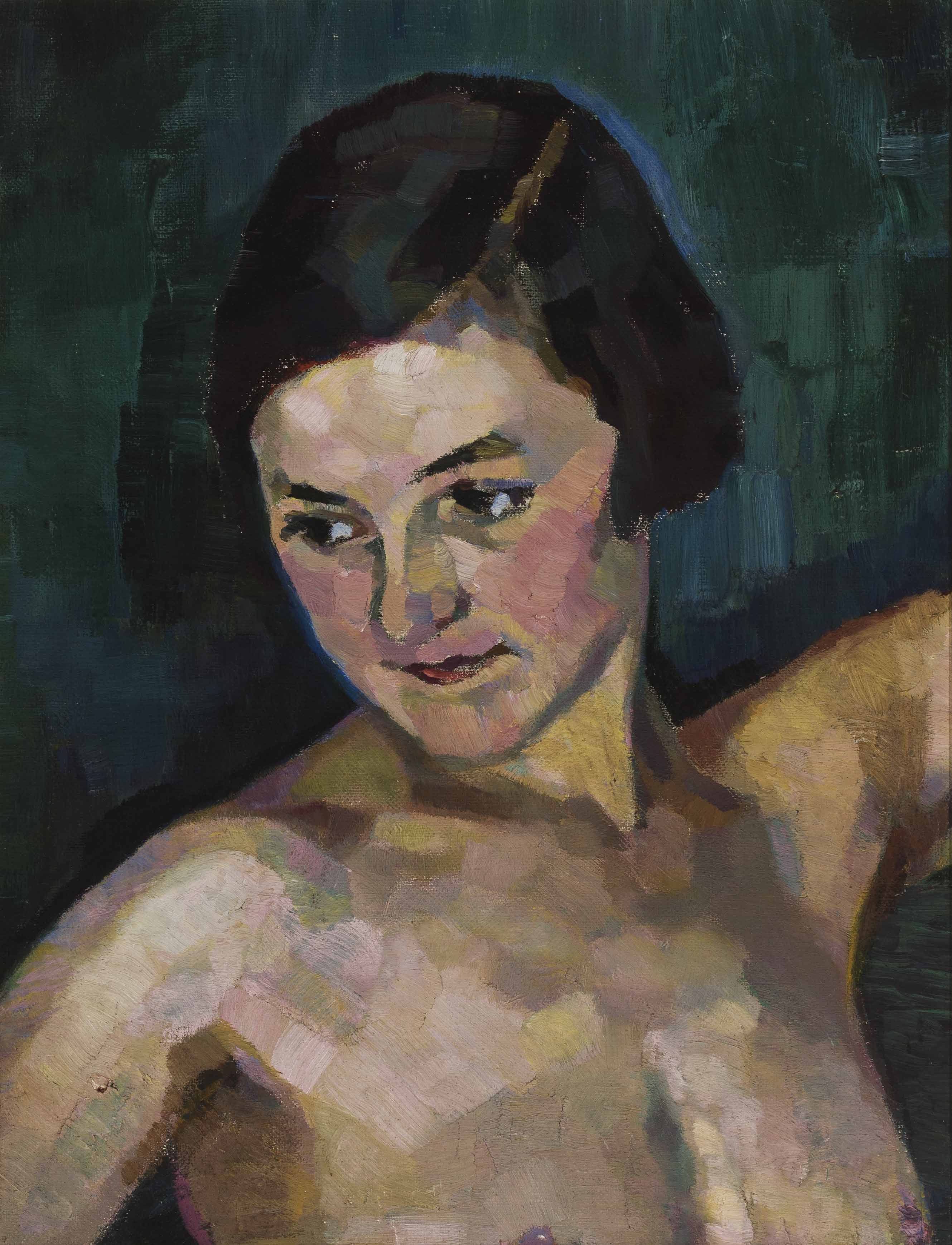 Studie III zu dem Bild Drei Generationen